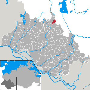 Pampow in Mecklenburg-Vorpommern - district Ludwigslust